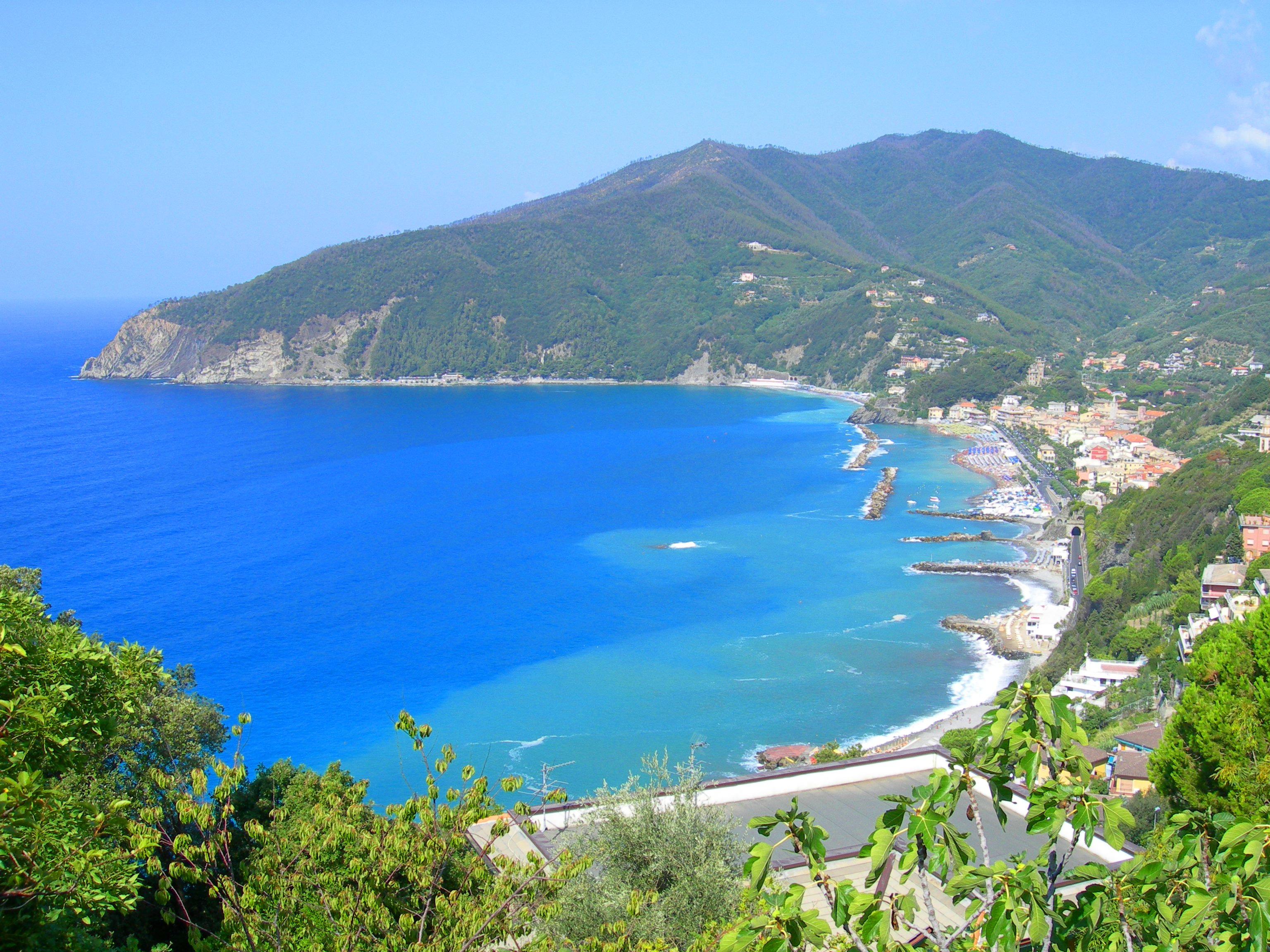 Panorama del golfo di Moneglia. Foto scattata da Fiore.